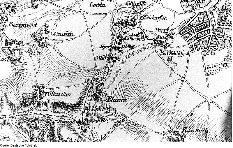 Original image description from the Deutsche Fotothek Dresden-Plauen. Ausschnitt aus: Karte von einem Teil des Kurfürstentums Sachsen, Petri, nach 1759 (Sign.: VII 63)